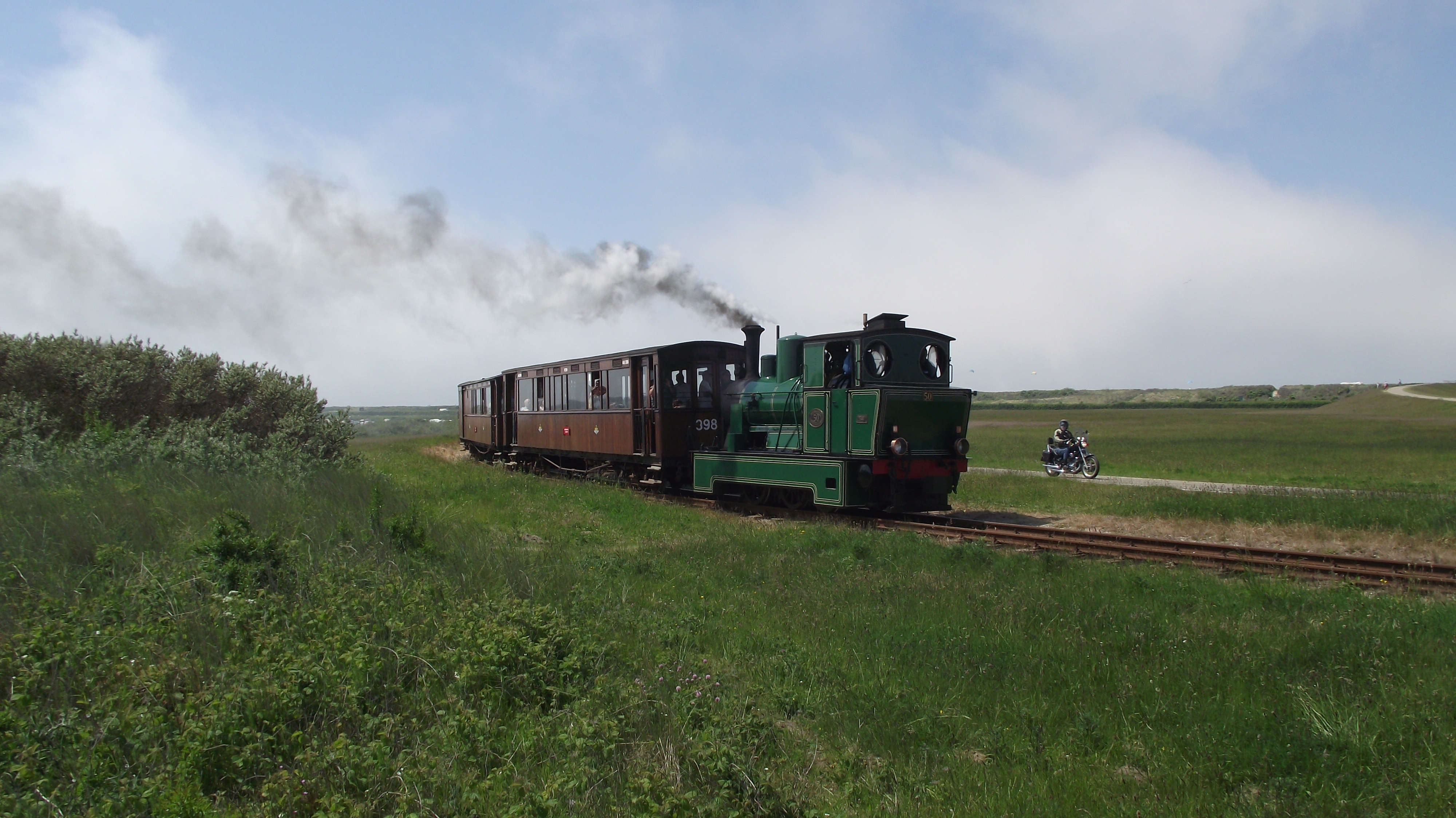 Een zaterdag langs de Brouwersdam met de Stichting voorheem RTM